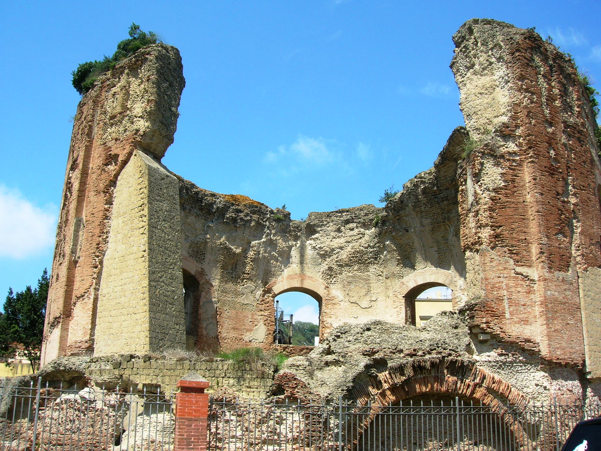 Il cosiddetto tempio di Venere a Baia